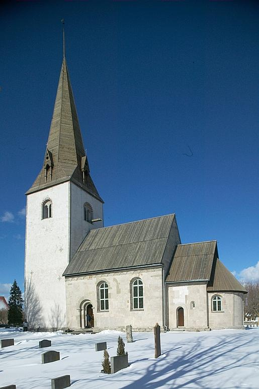 Kyrkan från söder. Motiv: Fardhems kyrka Nyckelord: Riksintressen Kategori: (01) ExteriörerKyrkan från söder.